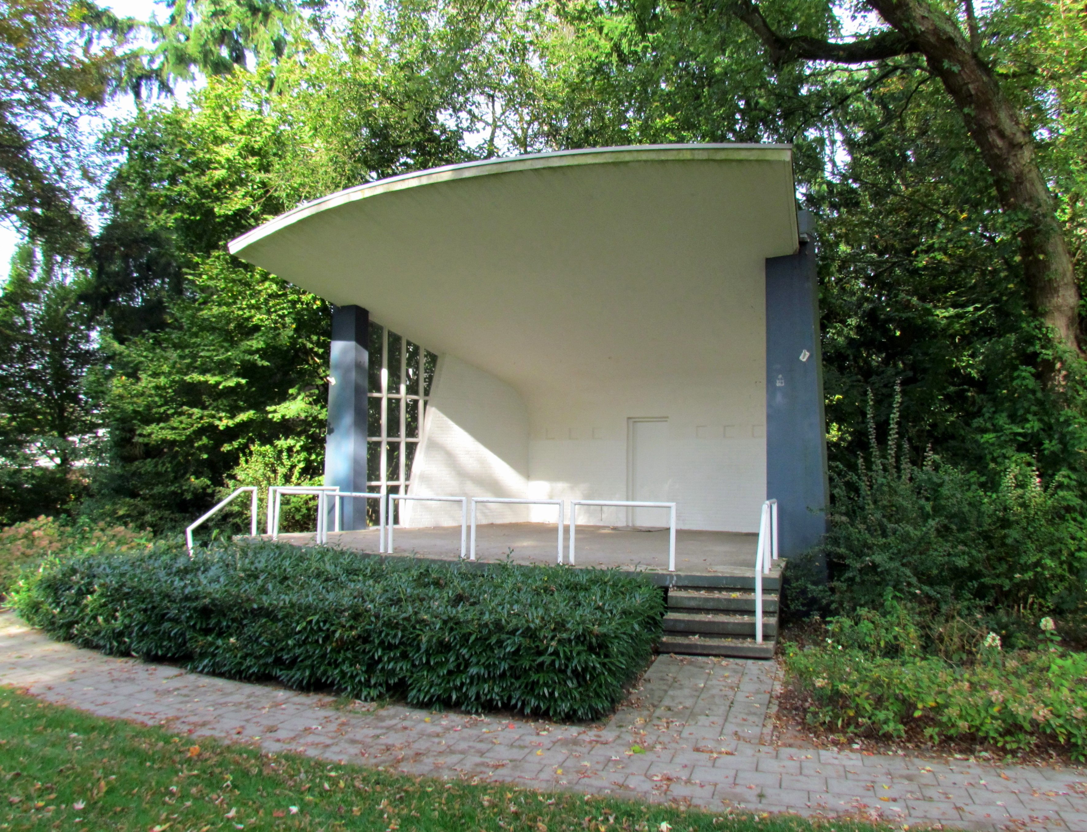 Muziektent (1995) in het Teixeira de Mattospark in Beekbergen (NL)